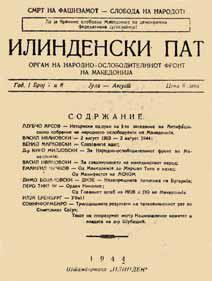 Илинденски път